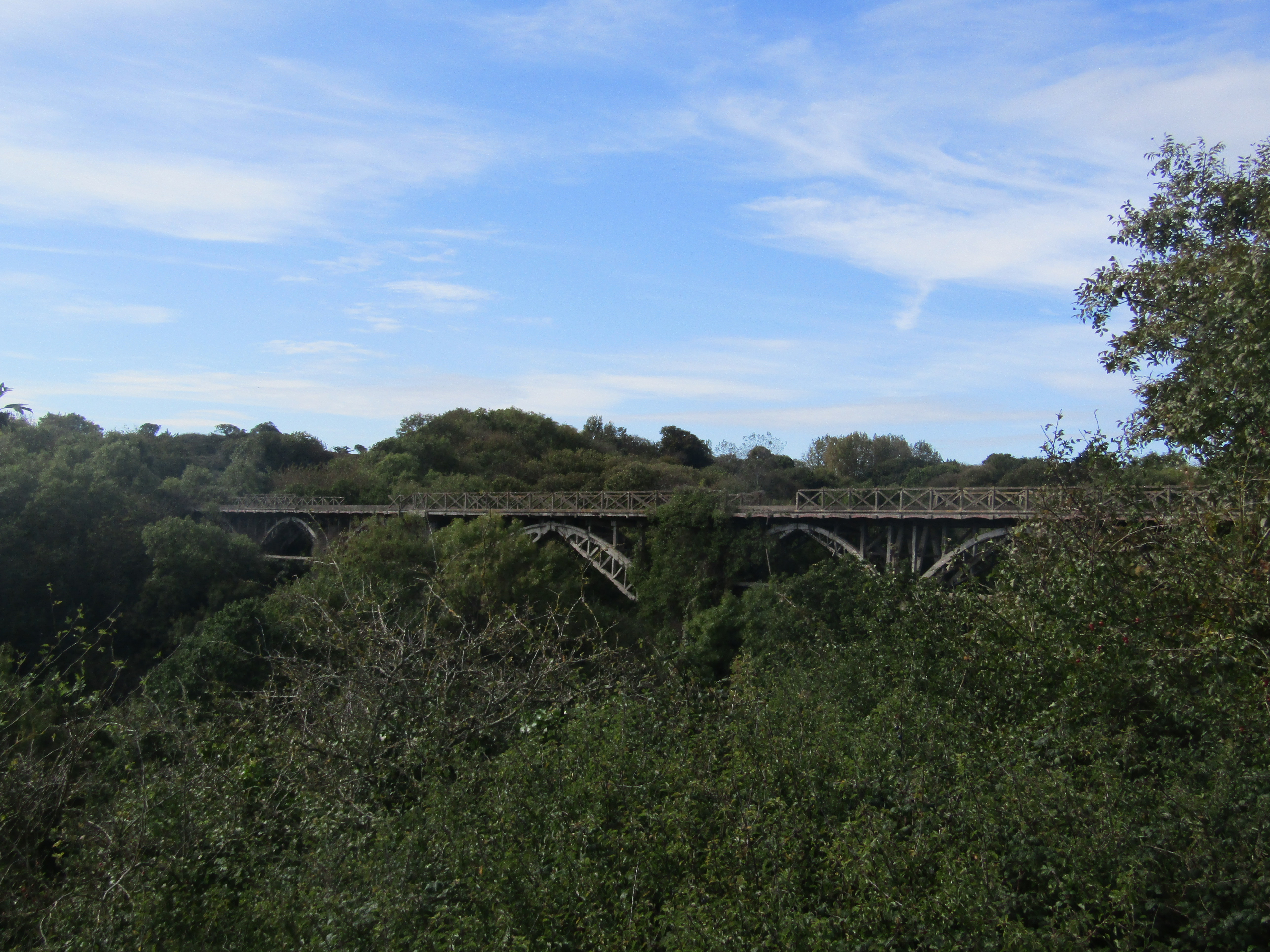 Le Viaduc de Port-Nieux côté Plévenon en septembre 2017